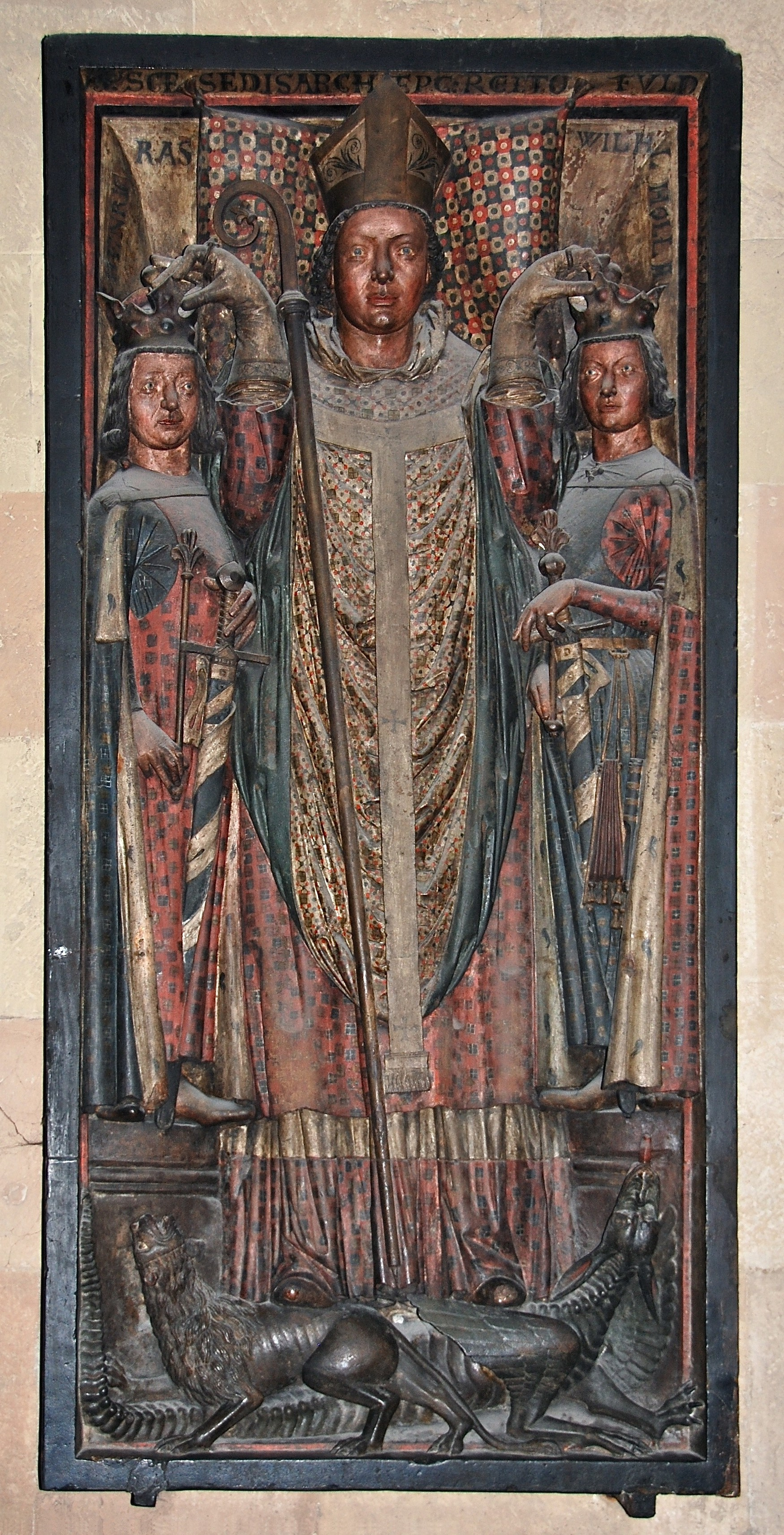 Grabmal von Siegfried III. von Eppstein, Erzbischof von Mainz, das ihn zeigt, als er Heinrich Raspe und Wilhelm von Holland die Krone aufsetzt